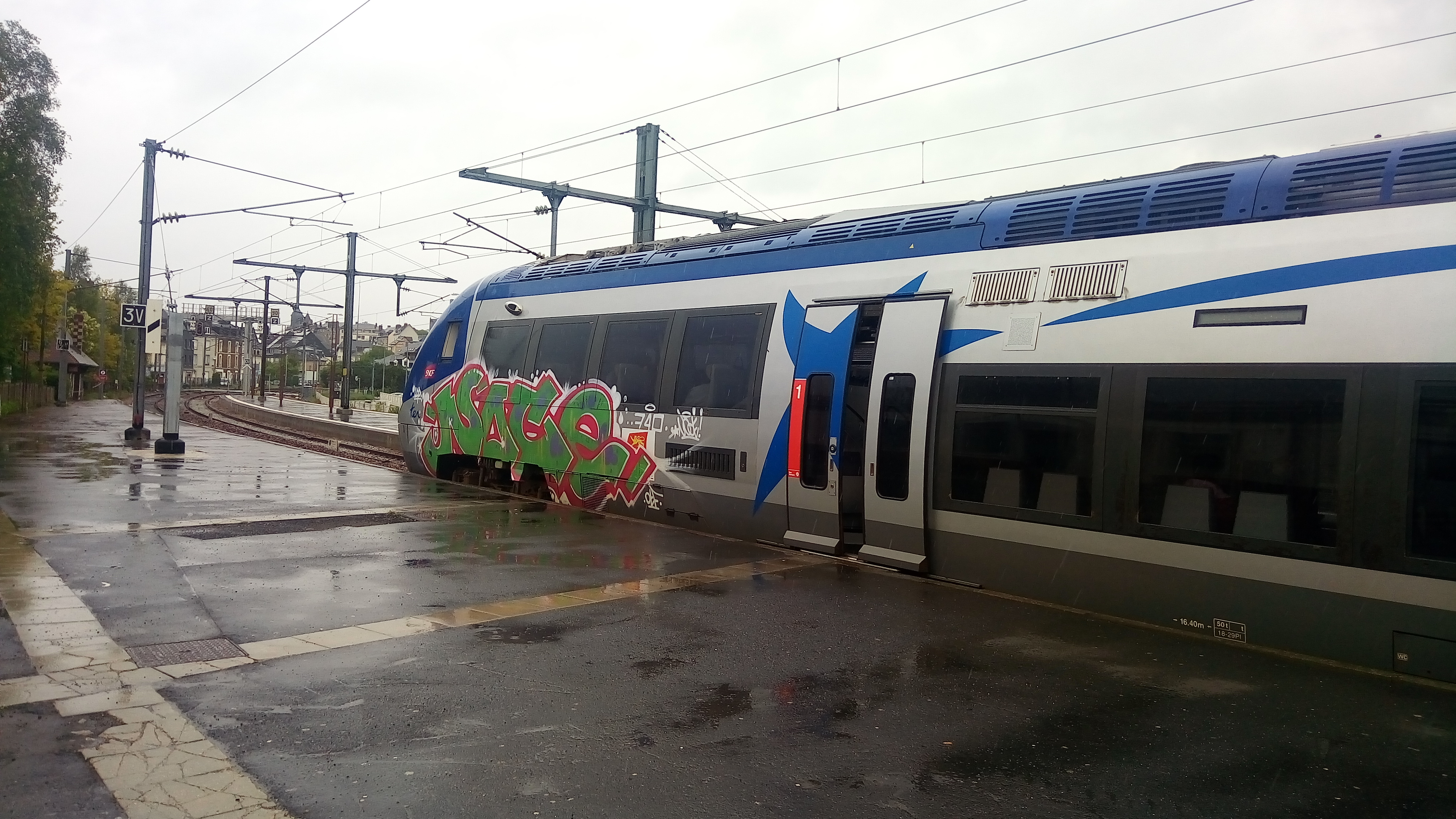 TER avec des graffitis en gare de Lisieux